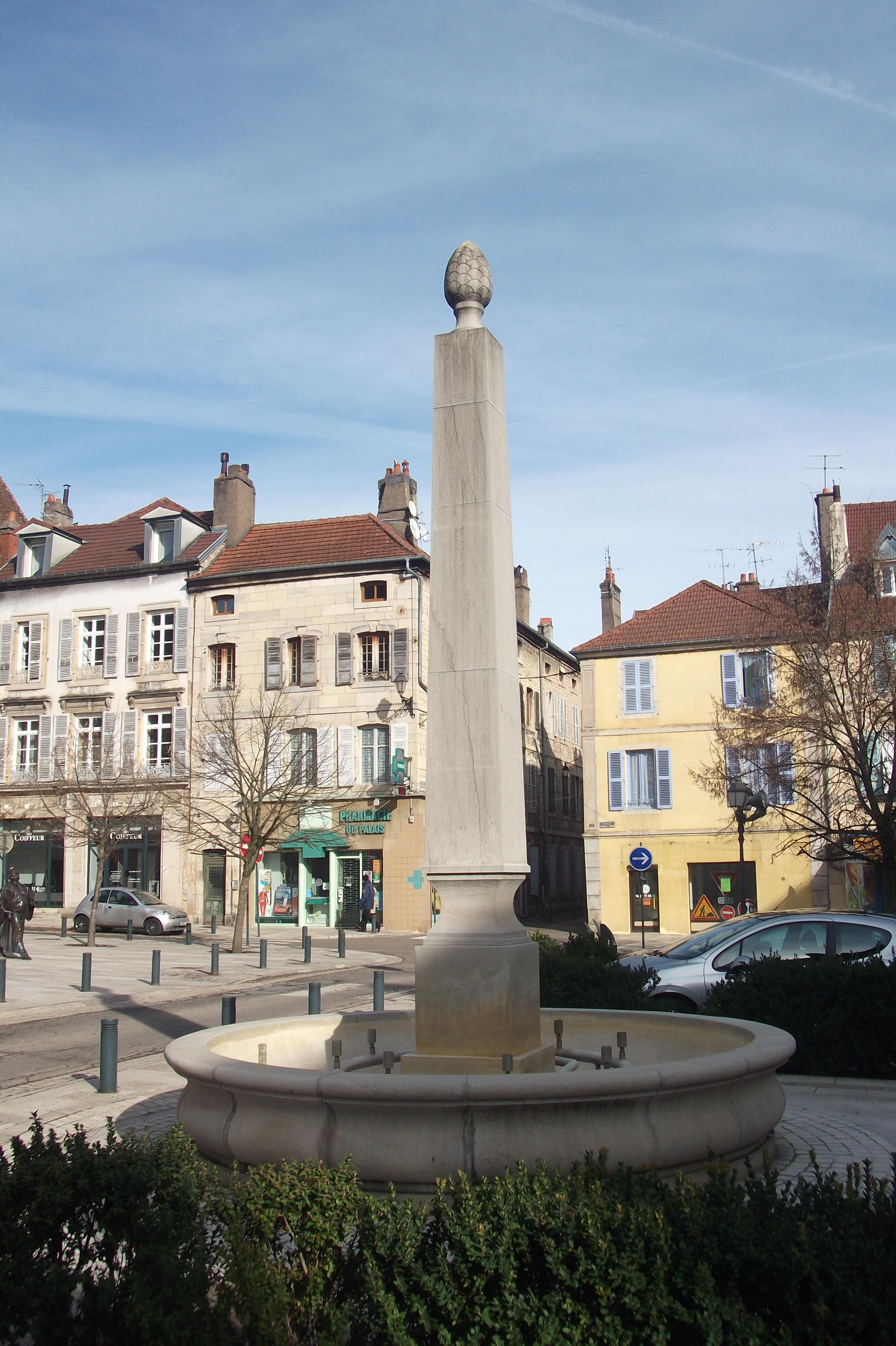 La Fontaine à l'obélisque de Vesoul